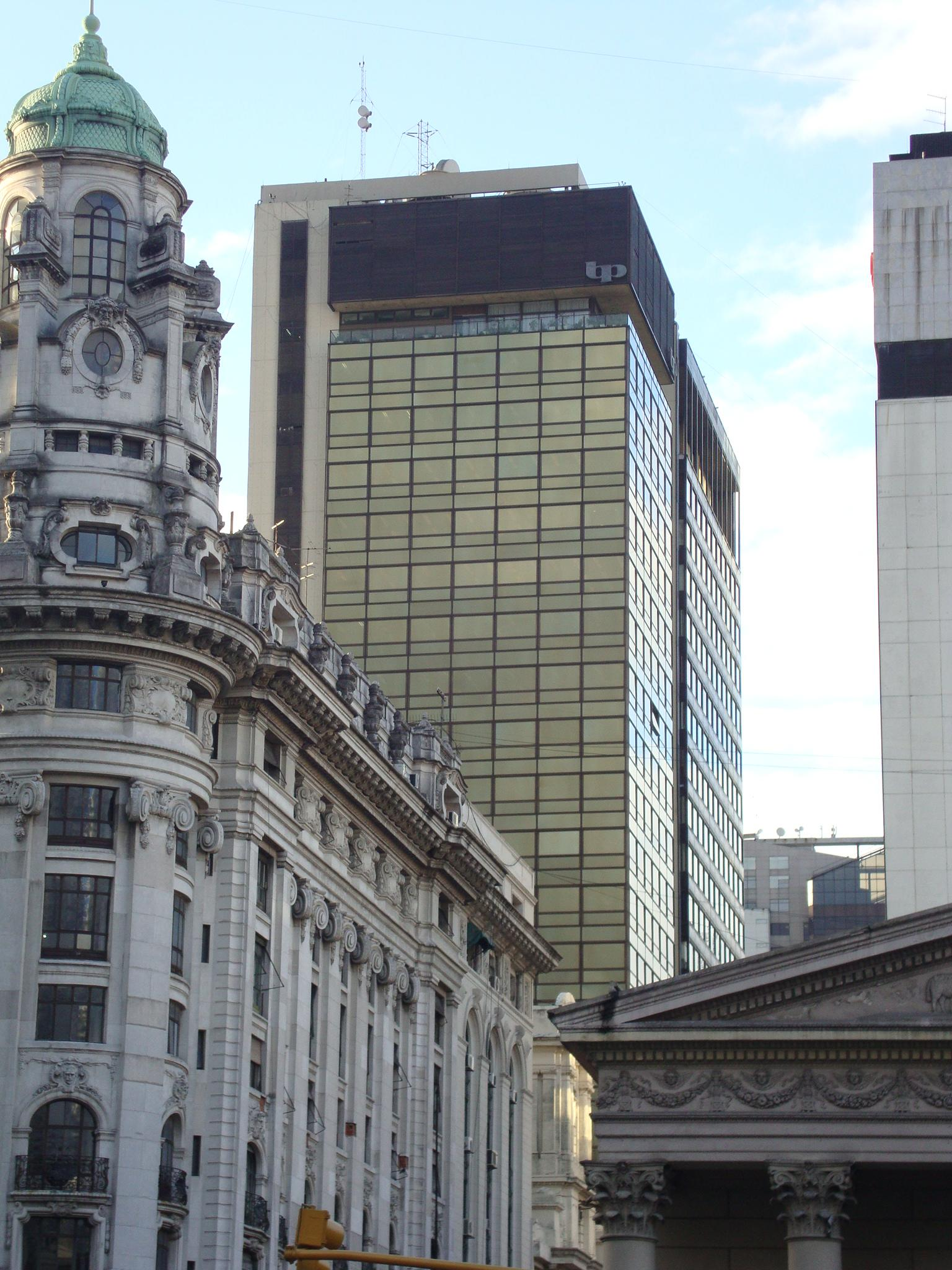 La torre del Banco de la Provincia de Buenos Aires visto desde la Plaza de Mayo. A su izquierda, el edificio del ex Banco Argentino-Uruguayo (hoy Jefatura del Gabinete de Ministros), a su derecha, el Edificio del Banco Santander Río y la Catedral Metropolitana (Buenos Aires, Argentina).